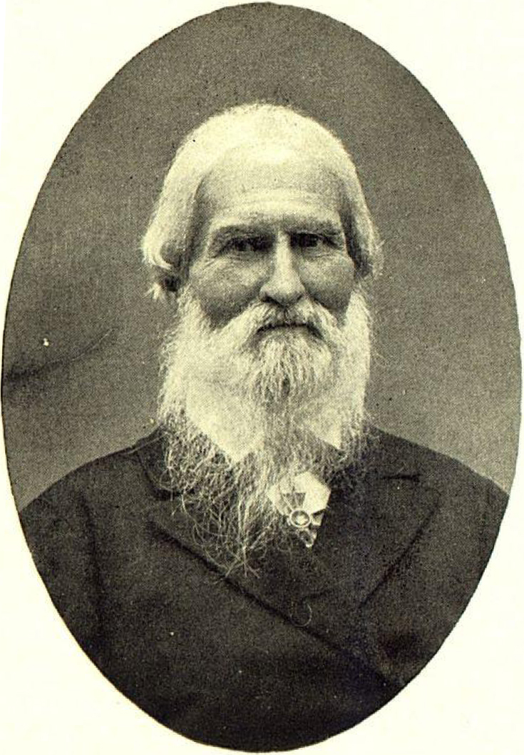 Елисеев Григорий Петрович, предприниматель, коммерции советник